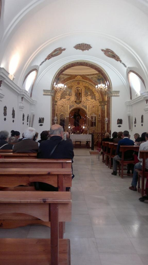 Ermita de Jesus